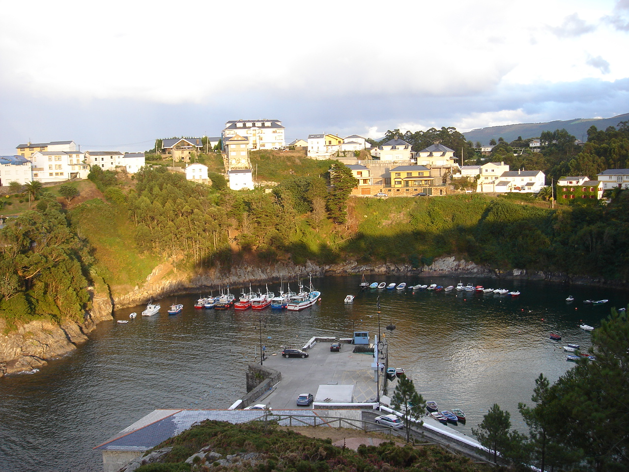 Puerto de Viavelez